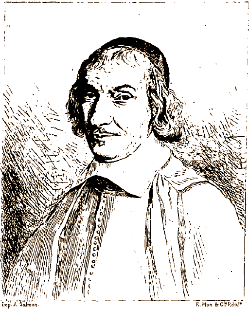 Michel de Marolles